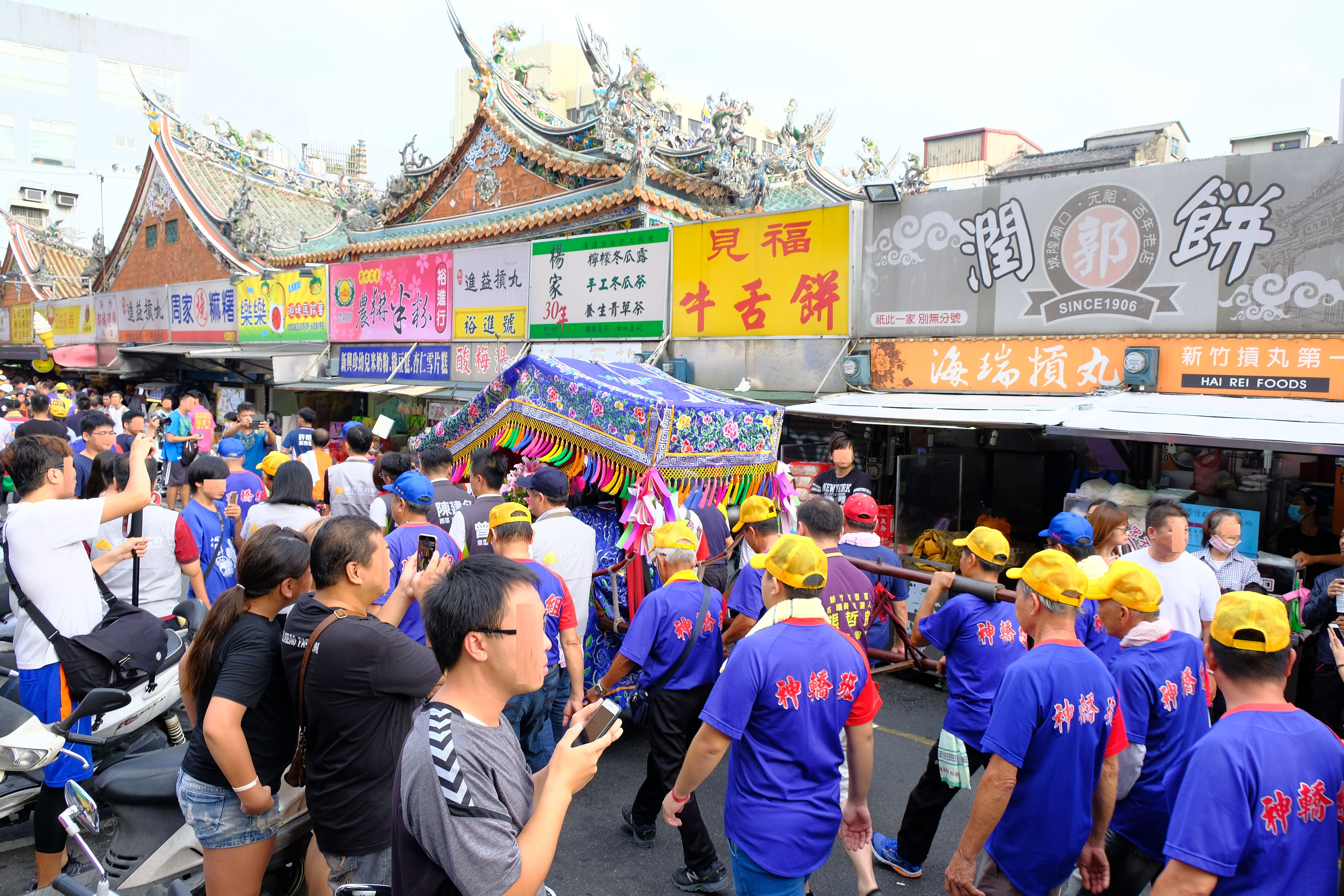 2018 Hsinchu City God Temple 農曆七月初一日脫枷消業植福法會新竹都城隍廟神轎班